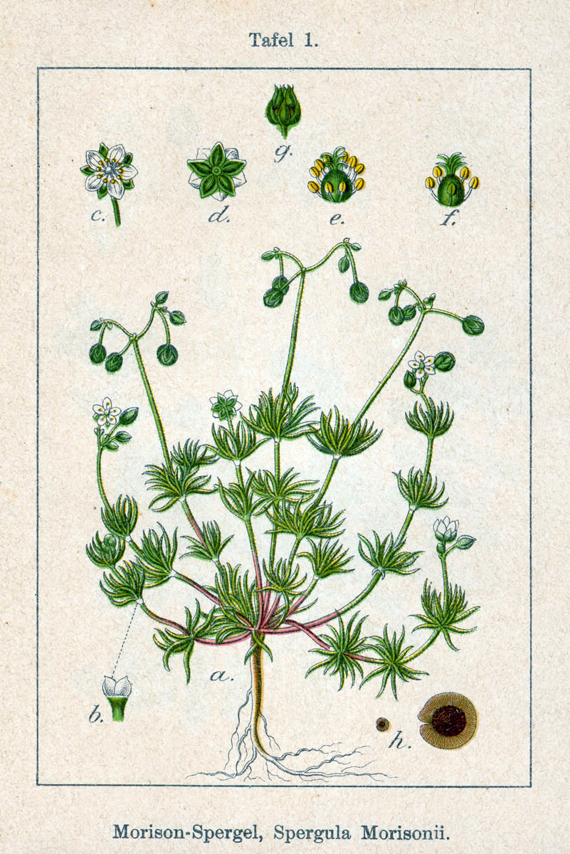 Spergula morisonii Boreau Original Description Morison-Spergel, Spergula morisonii